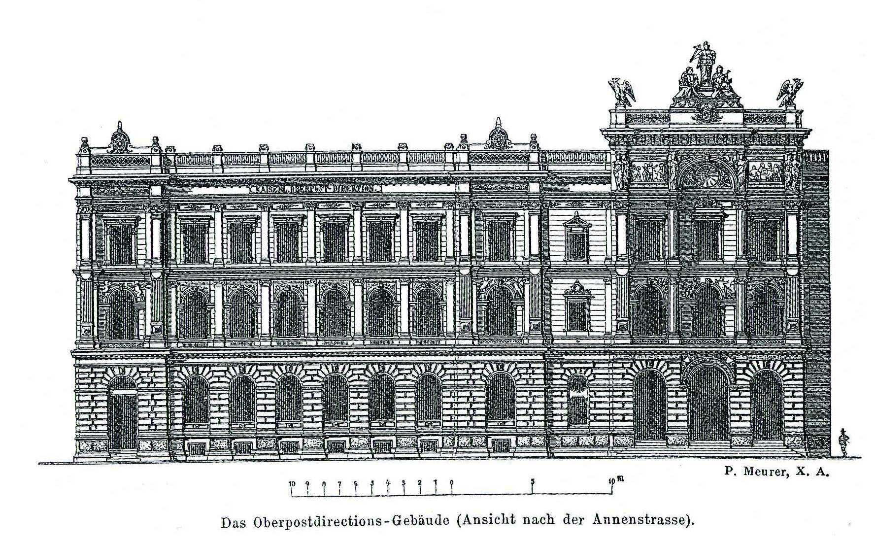 Dresden Oberpostdirektion an der Annenstraße von Carl Christ Zopff Neorenaissancebau von 1878